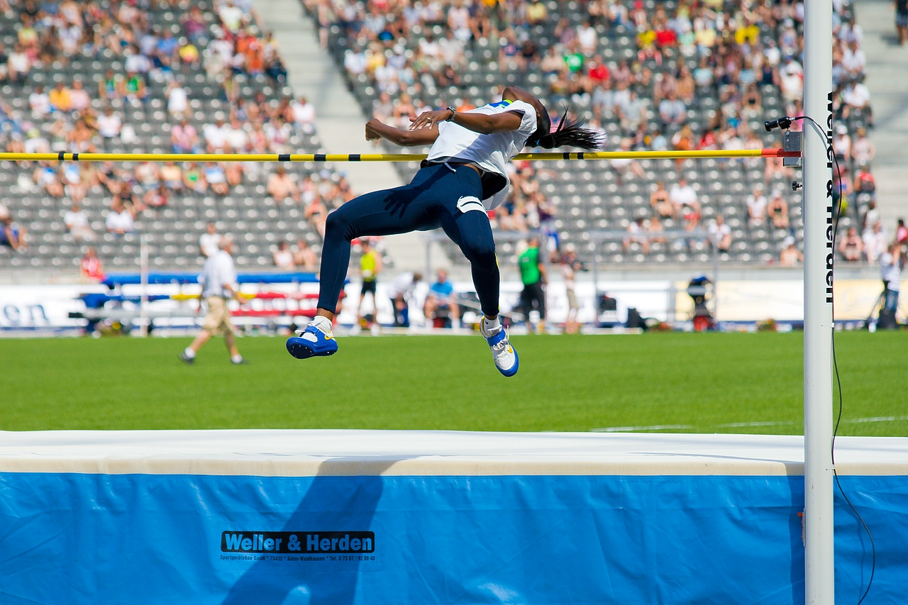 Chaunté Howard al Meeting Istaf di Berlino in una data della "Golden League" del 2008.